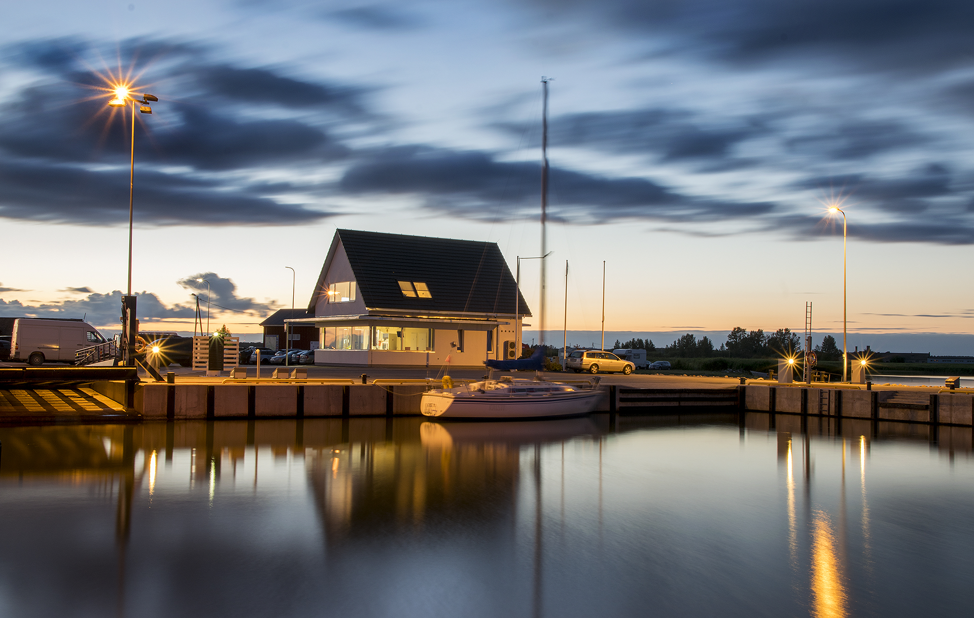 Munalaiu sadam, Tõstamaa vald